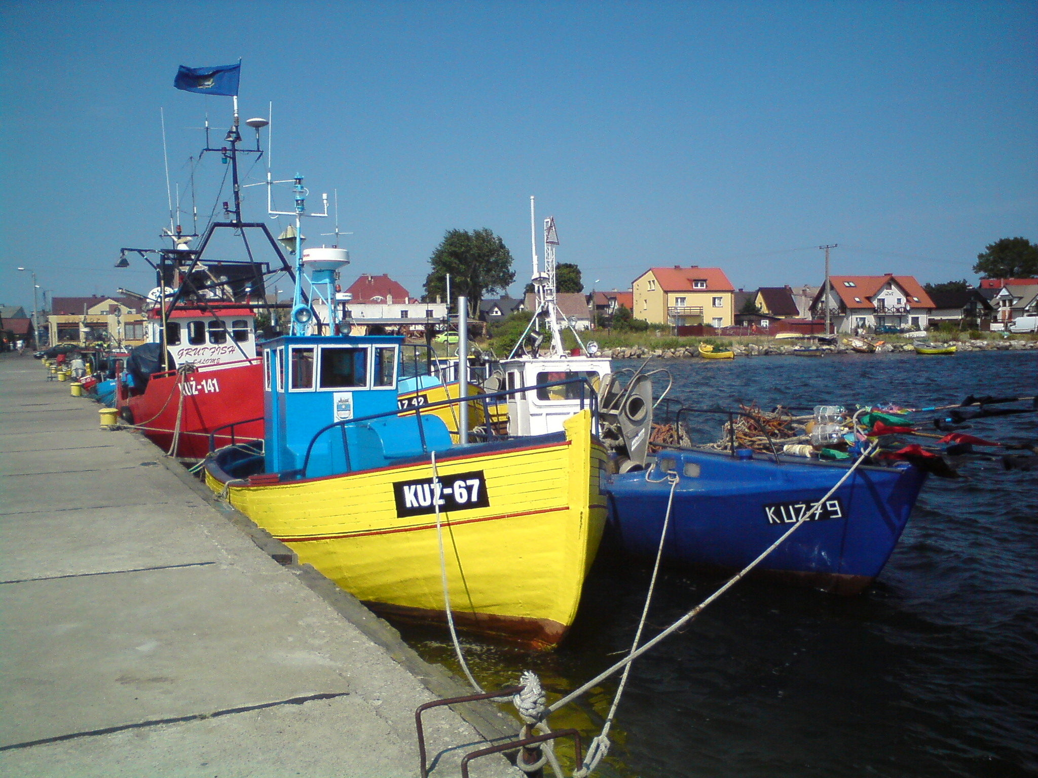 Kutry rybackie na kuźnickiej przystani.